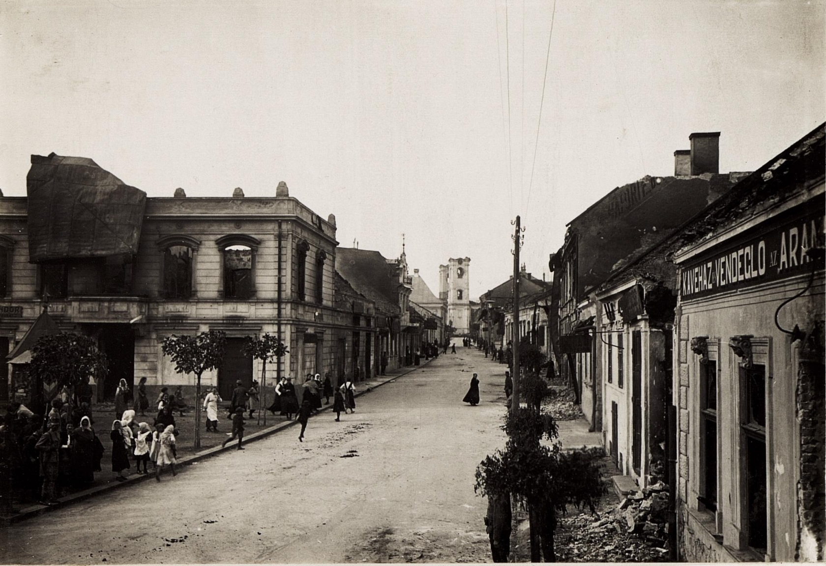 Kaiser Karl I. und Kaiserin Zita besuchen das am 21.5.1917 von einem Brand zerstörte Gyöngyös am 23.5.1917